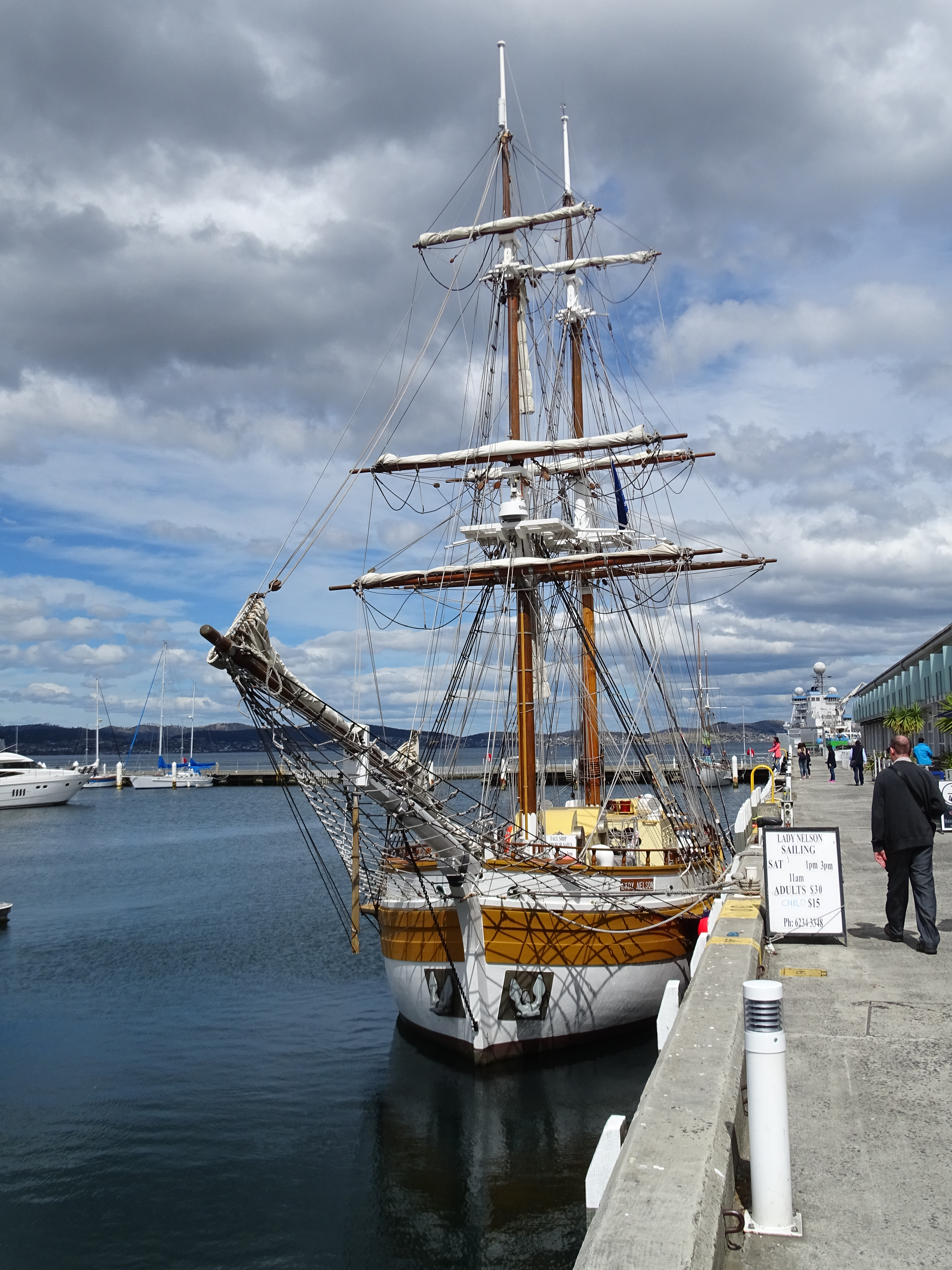 Segelschiff "HMS Lady Nelson" (heute für Hafenrundfahrten verwendet, Nachbildung von 1988) im Hafen von Hobart, Tasmanien (Sullivans Cave Marina)